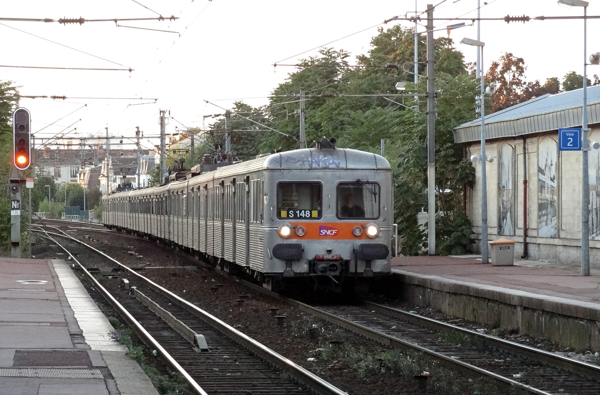 Z 6100 en gare d'Enghien-les-Bains, Val-d'Oise, France.